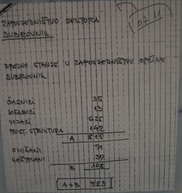 Muzejski eksponat muzeja Domovinskog rata u Dubrovniku